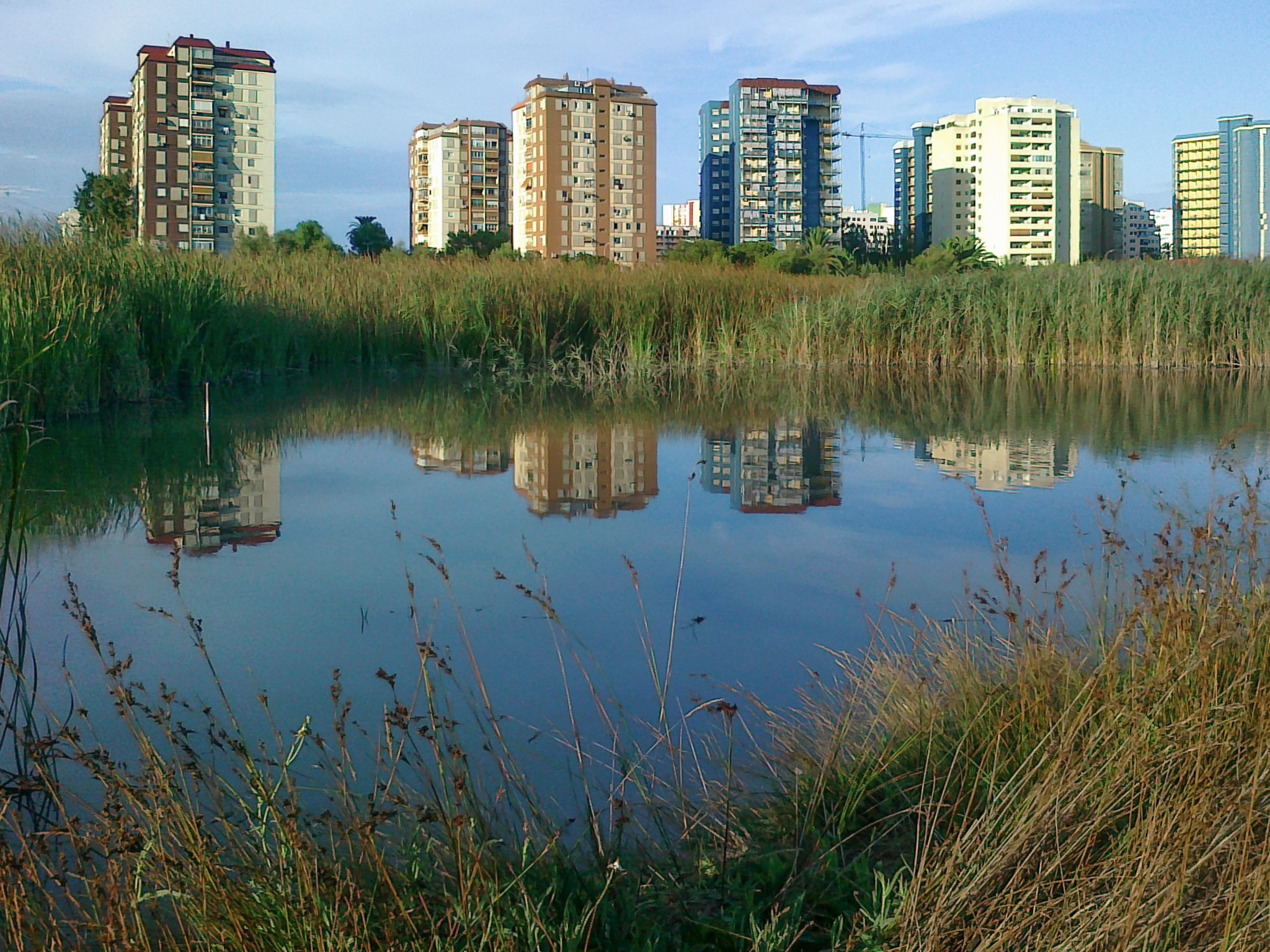 Marjal de Massamagrell